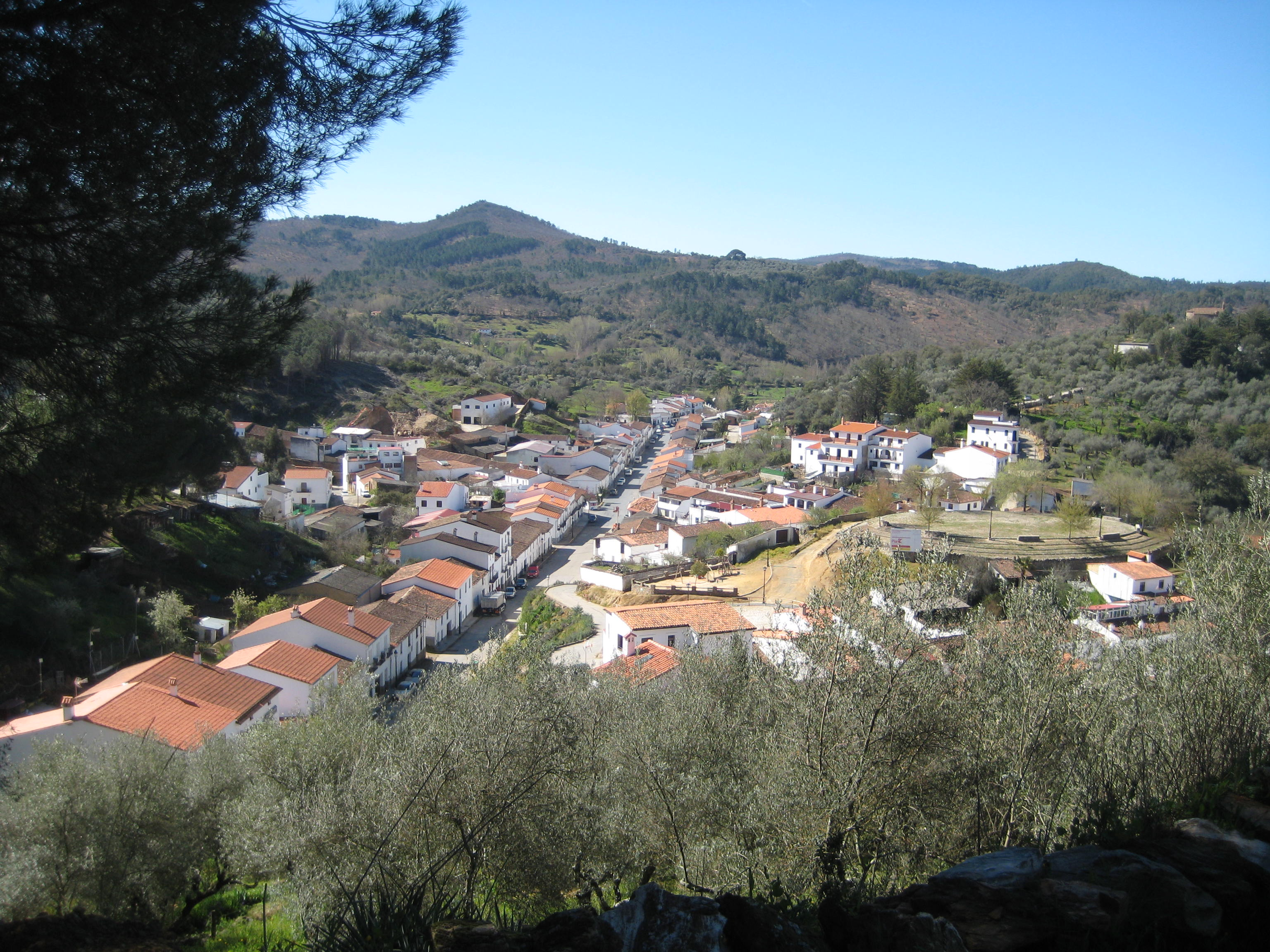 Vista de la Avenida de Los Carpinteros, en Galaroza, Huelva, España.